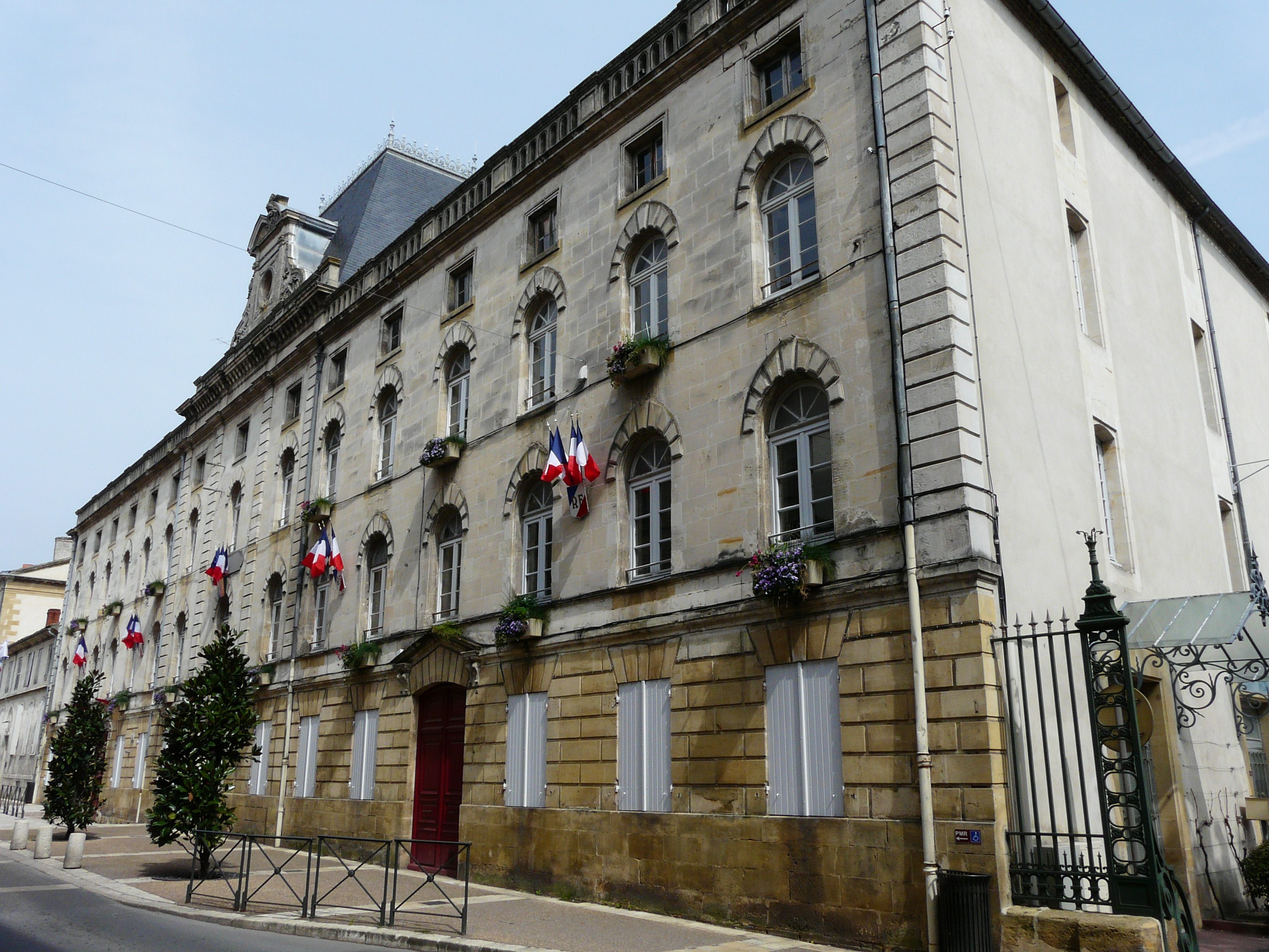 La mairie de Bergerac, Dordogne, France.